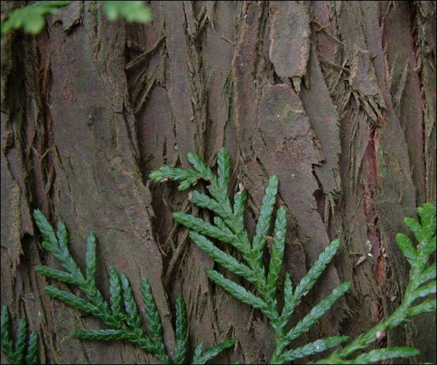 Thuja plicata -- Riesenlebensbaum (Deutschland, Königsforst, Nähe Köln)